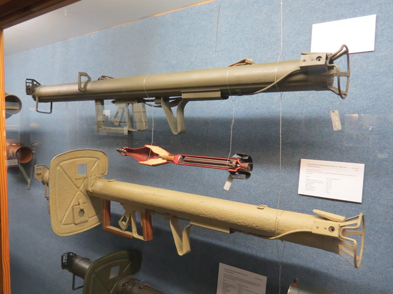 Raketenpanzerbüchsen und Projektil